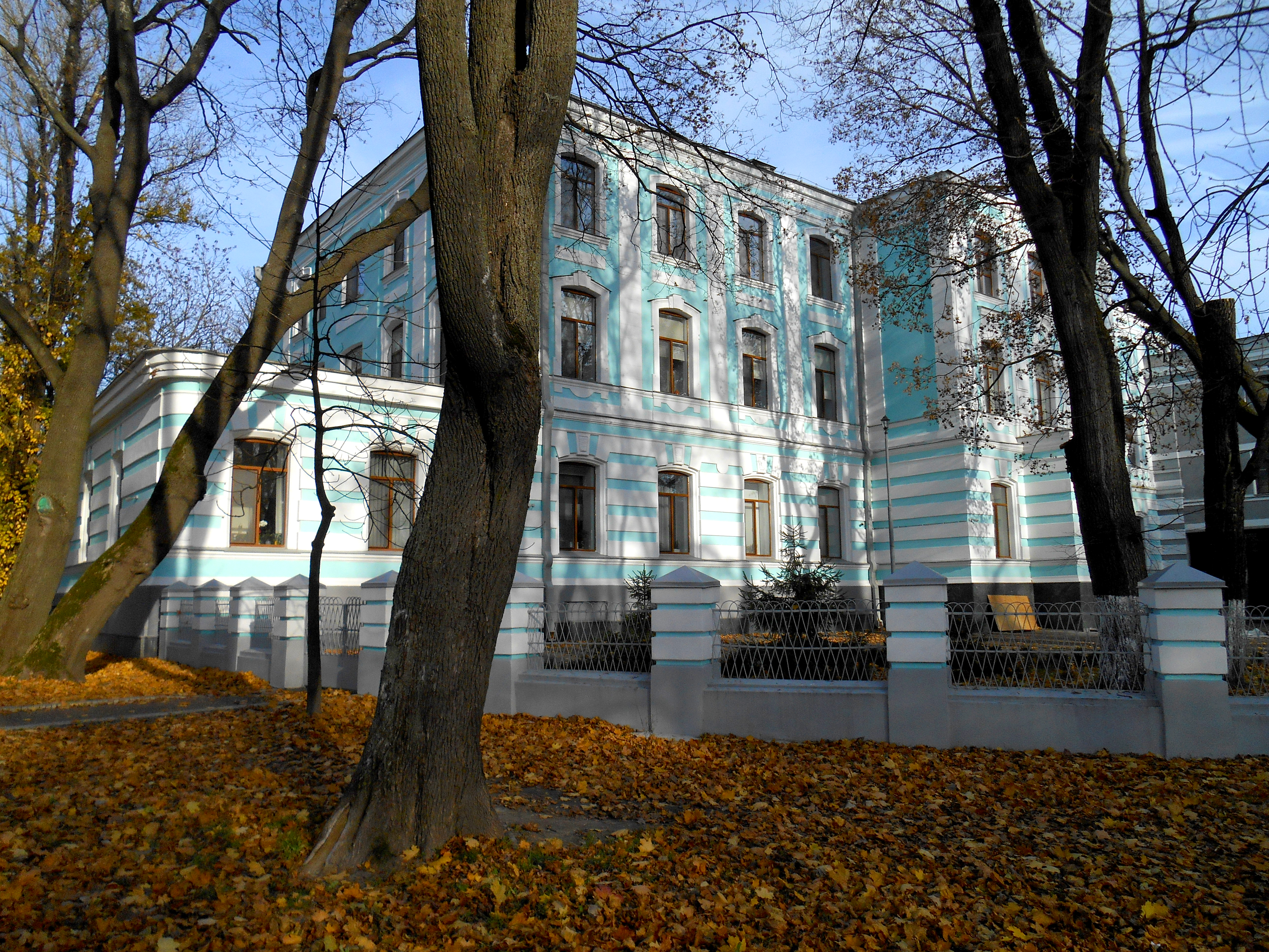 Будинок Київської удільної контори, де у 1885, 1886–1987 роках тимчасово проживала Марко Вовчок (М. О. Вілінська), у 1875–1983 роках мешкав В. І. Сичугов, архітектор, академік АМ; у 1952–1956 роках працював О. Н. Марзєєв, вчений-гігієніст, академік АМН, Київ, Грушевського Михайла вул., 7